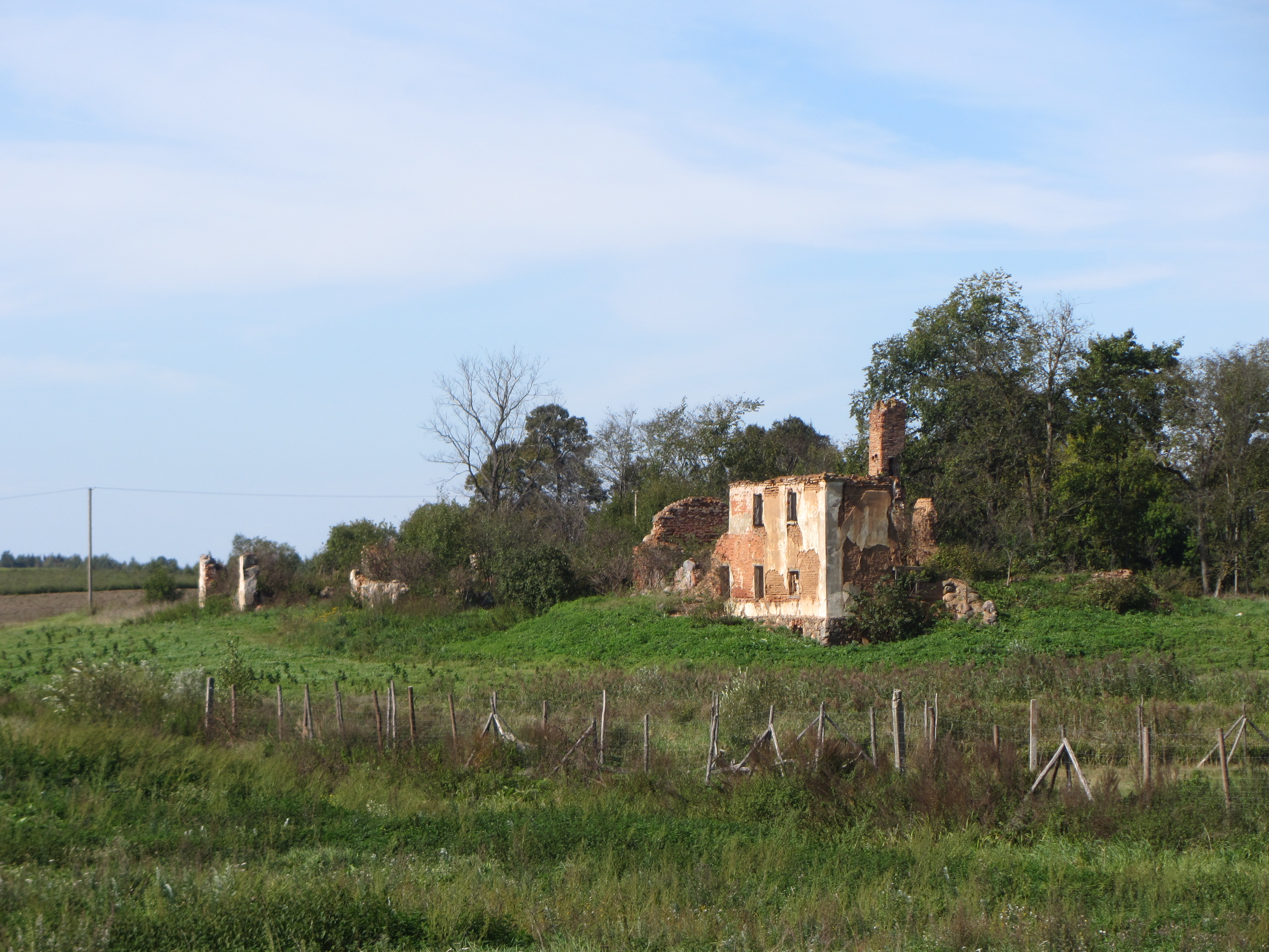 Meikštai 30279, Lithuania